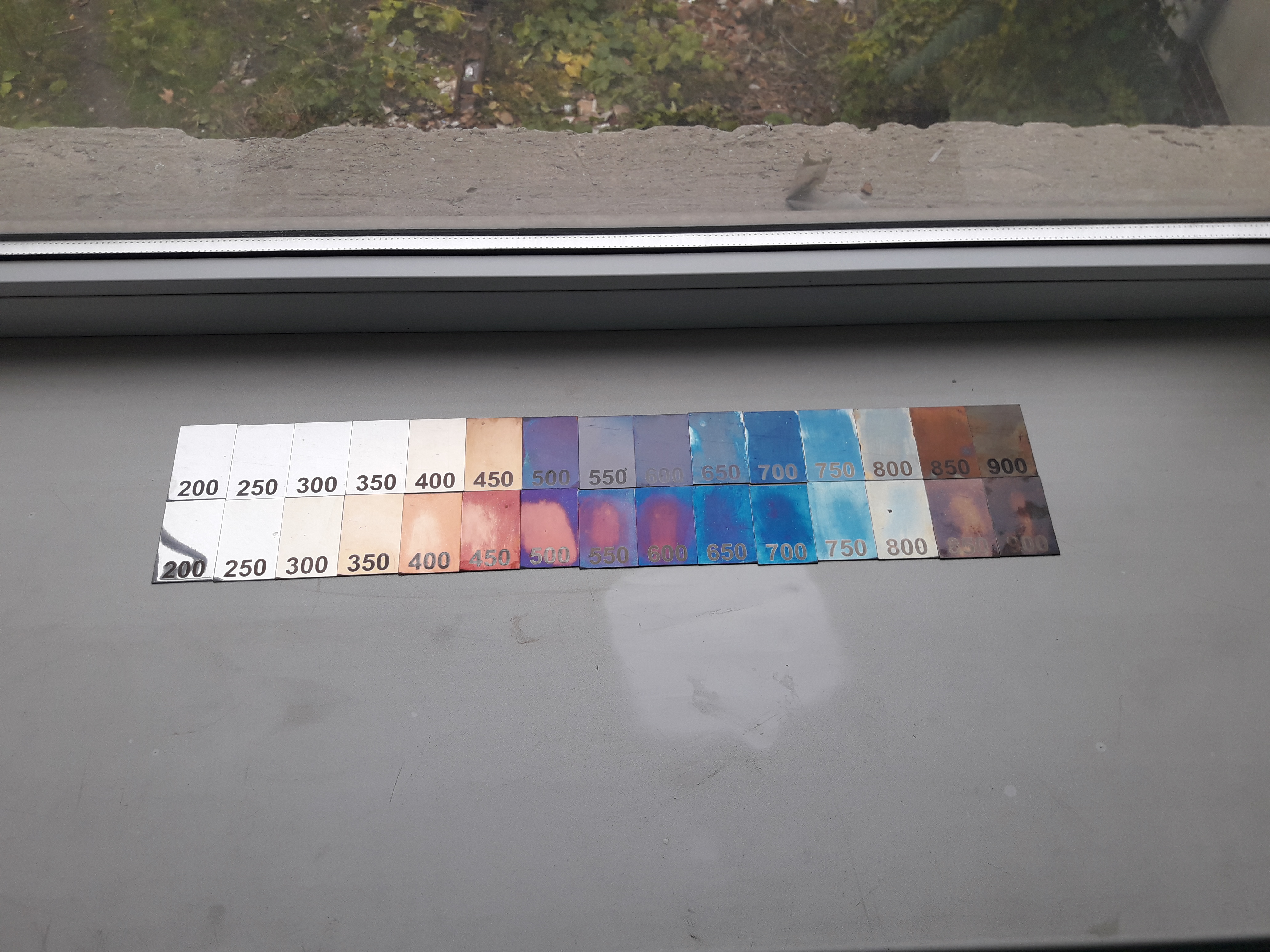 Цвета побежалости 12Х17(AISI 430) Температура указана в градусах Цельсия Время выдержки - 15 минут Искусственное освещение